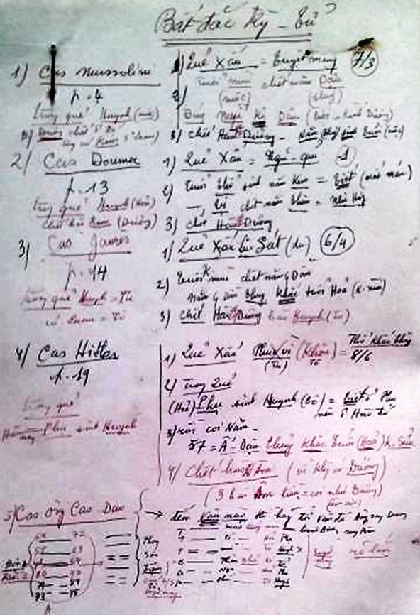 HLCom1